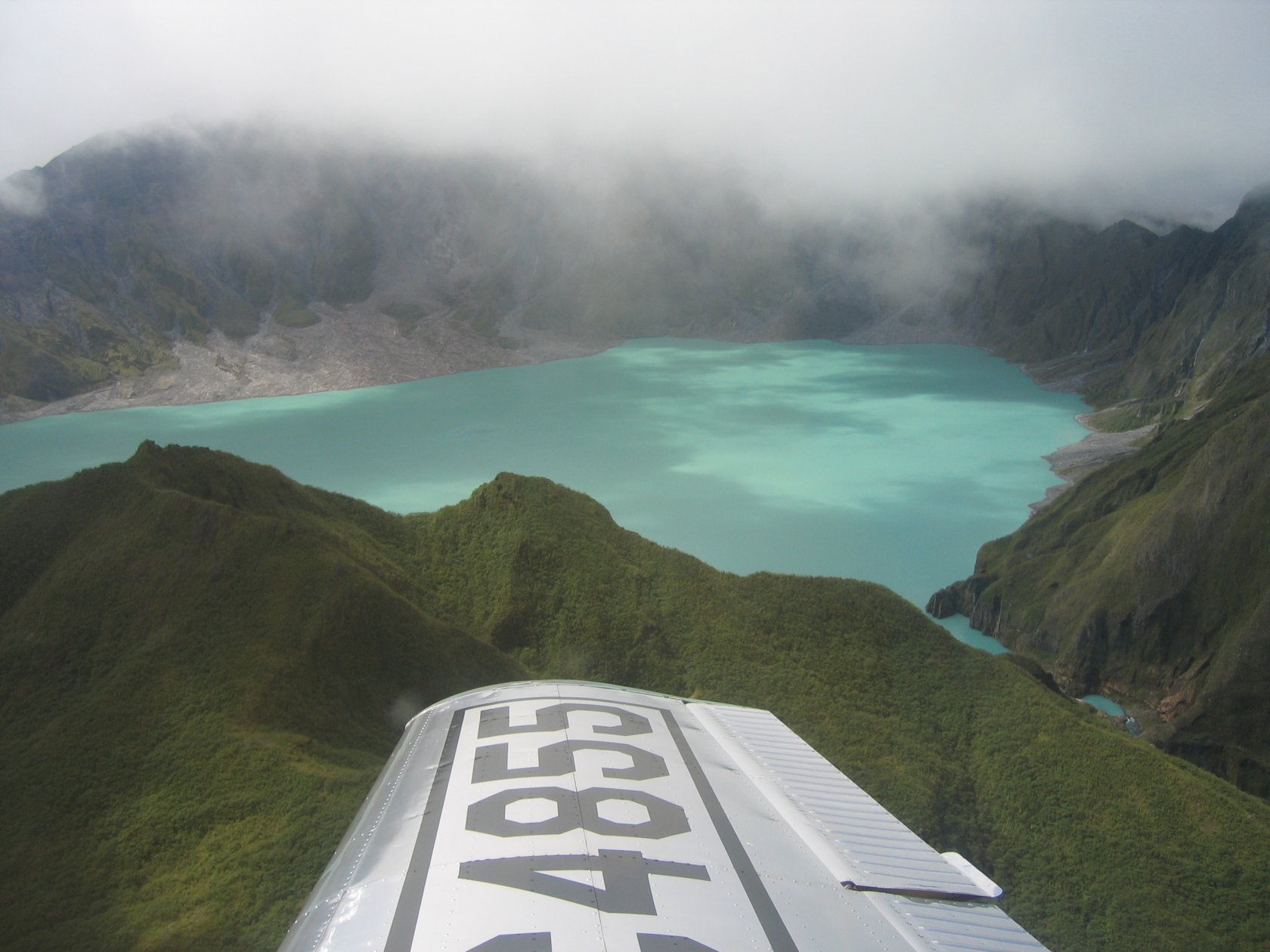 Crater lake on Mount Pinatubo, Luzon, Philippines